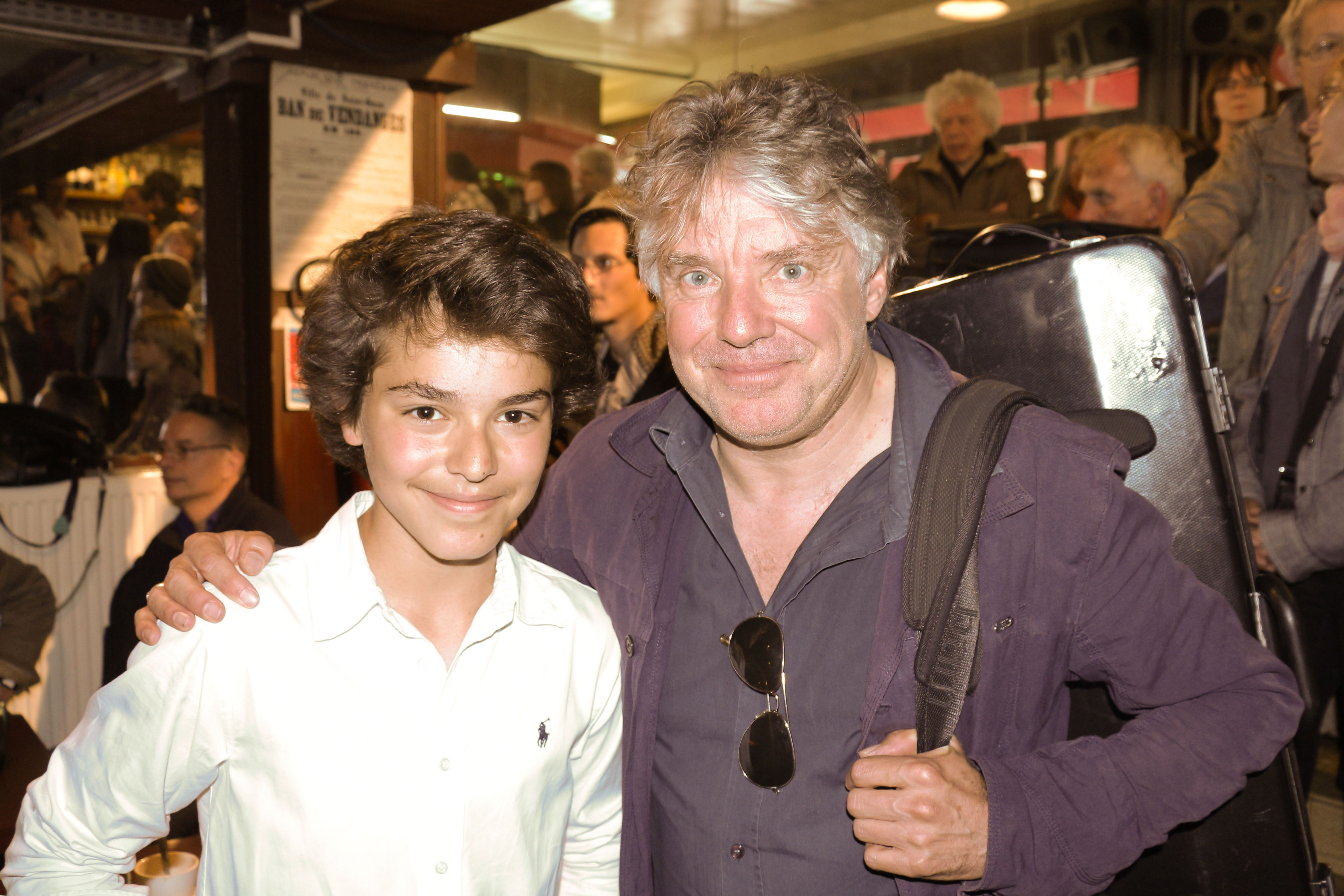 Tom Ibarra (13 ans), après la remise des prix au concours de jazz SACEM 2013 (Saint-Ouen), avec Didier Lockwood, membre du jury.